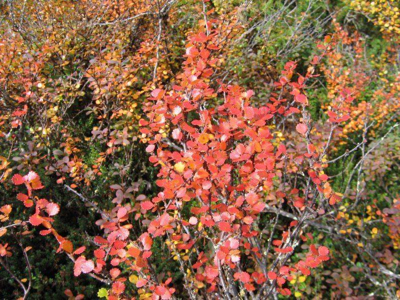 Zwergbirke Betula nana, photographiert in Jämtland, Schweden; dwarf birch (Betula nana), picture taken in Jämtland, Sweden